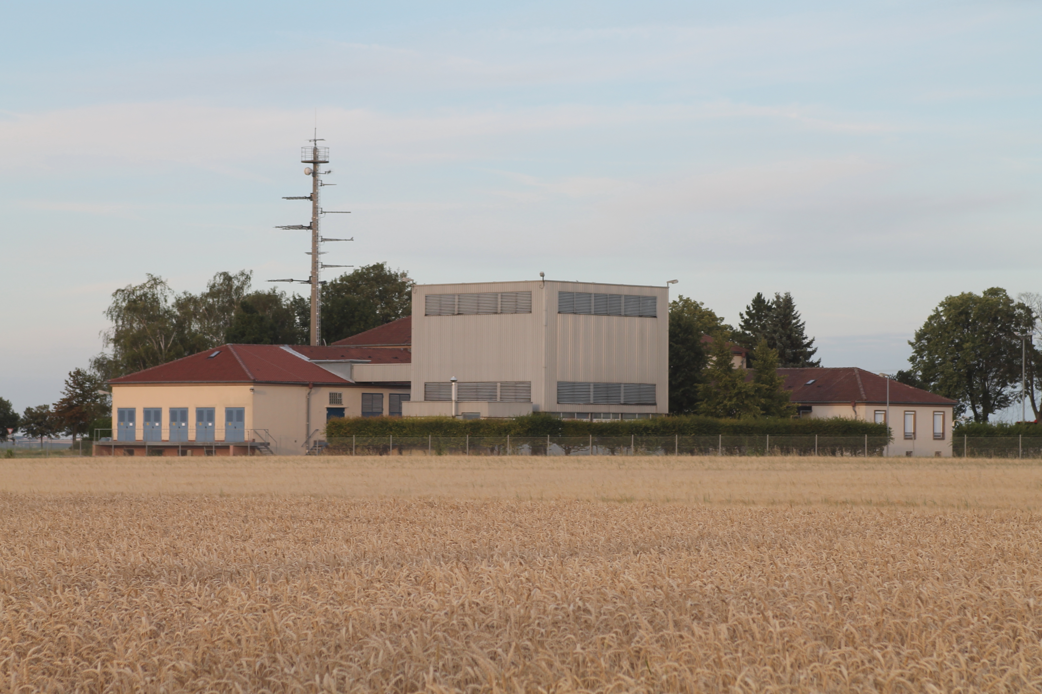 Sendergebäude des Rheinsenders